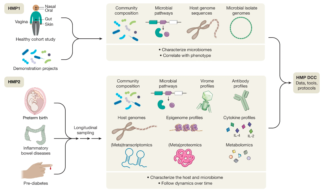 Overview of phases 1 and 2 of the human microbiome project. HMP1 focused on characterization of communities in different body sites. HMP2 focused in the integration of multiomic data from host & microbiome, drawing correlations with diabetes and inflammatory bowel disease. Data from the study are housed at HMP Data Coordination Center (DCC).